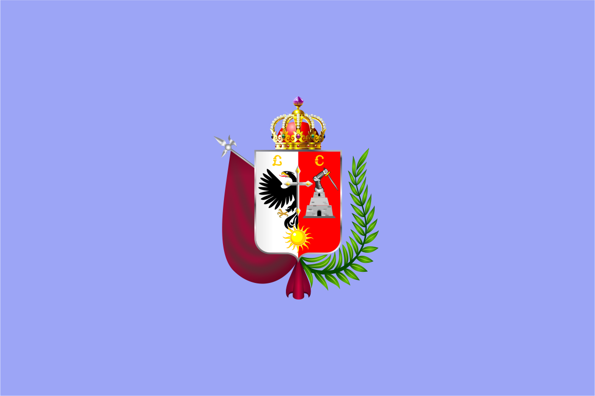 Provincia de Cajamarca